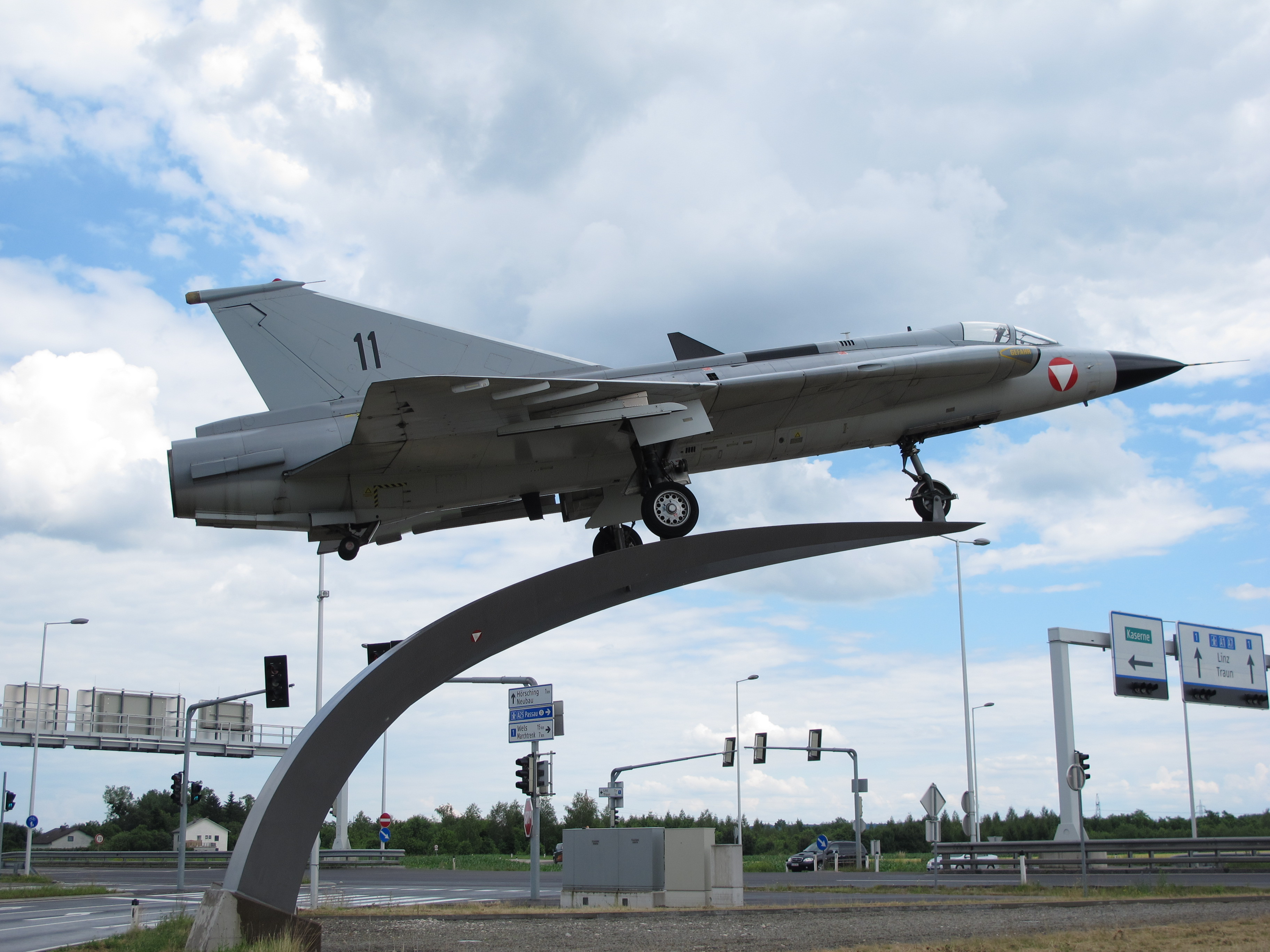 Fliegerhorst Vogler Hörsching Saab Draken J 35Ö